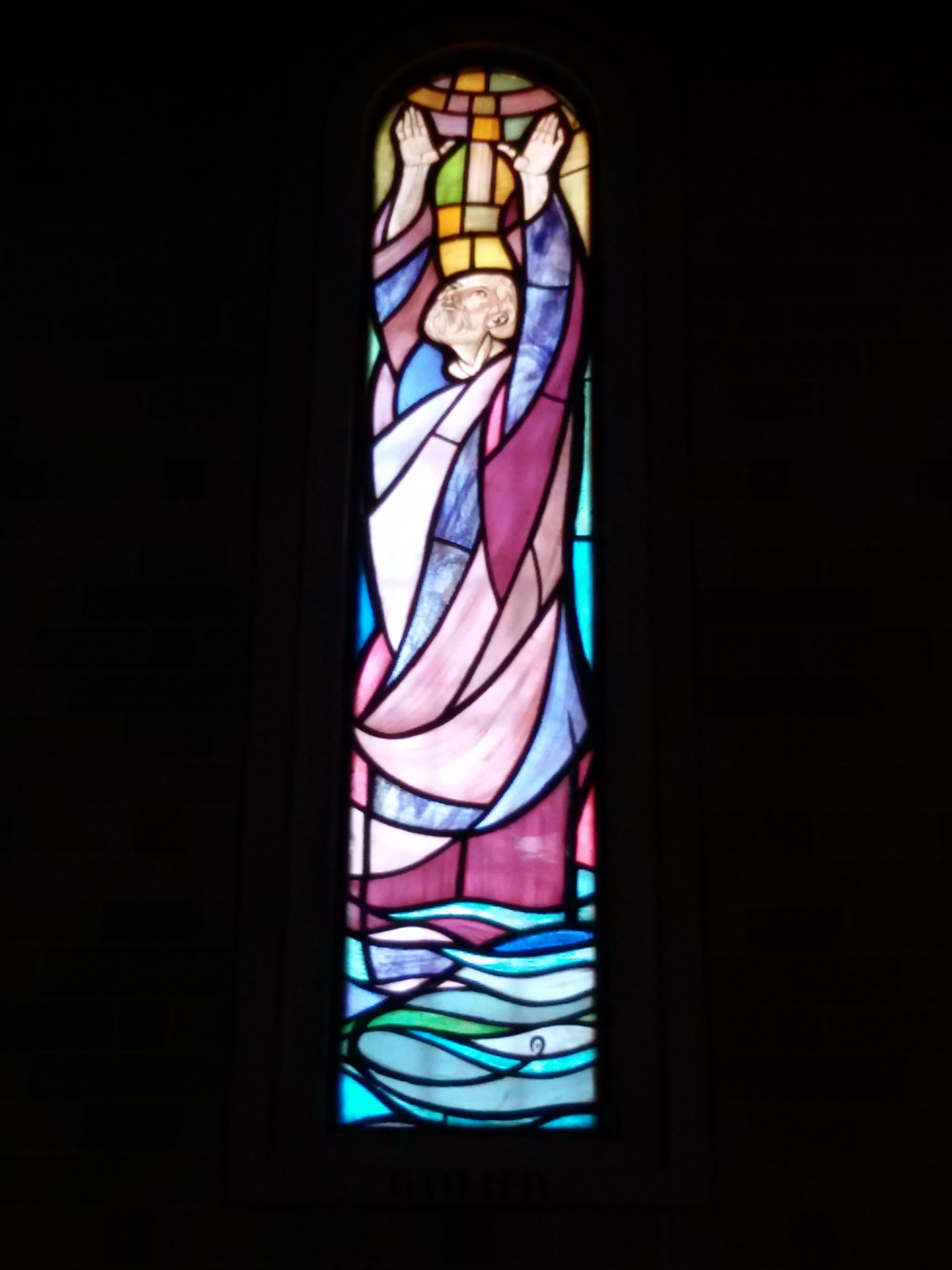 vetrata